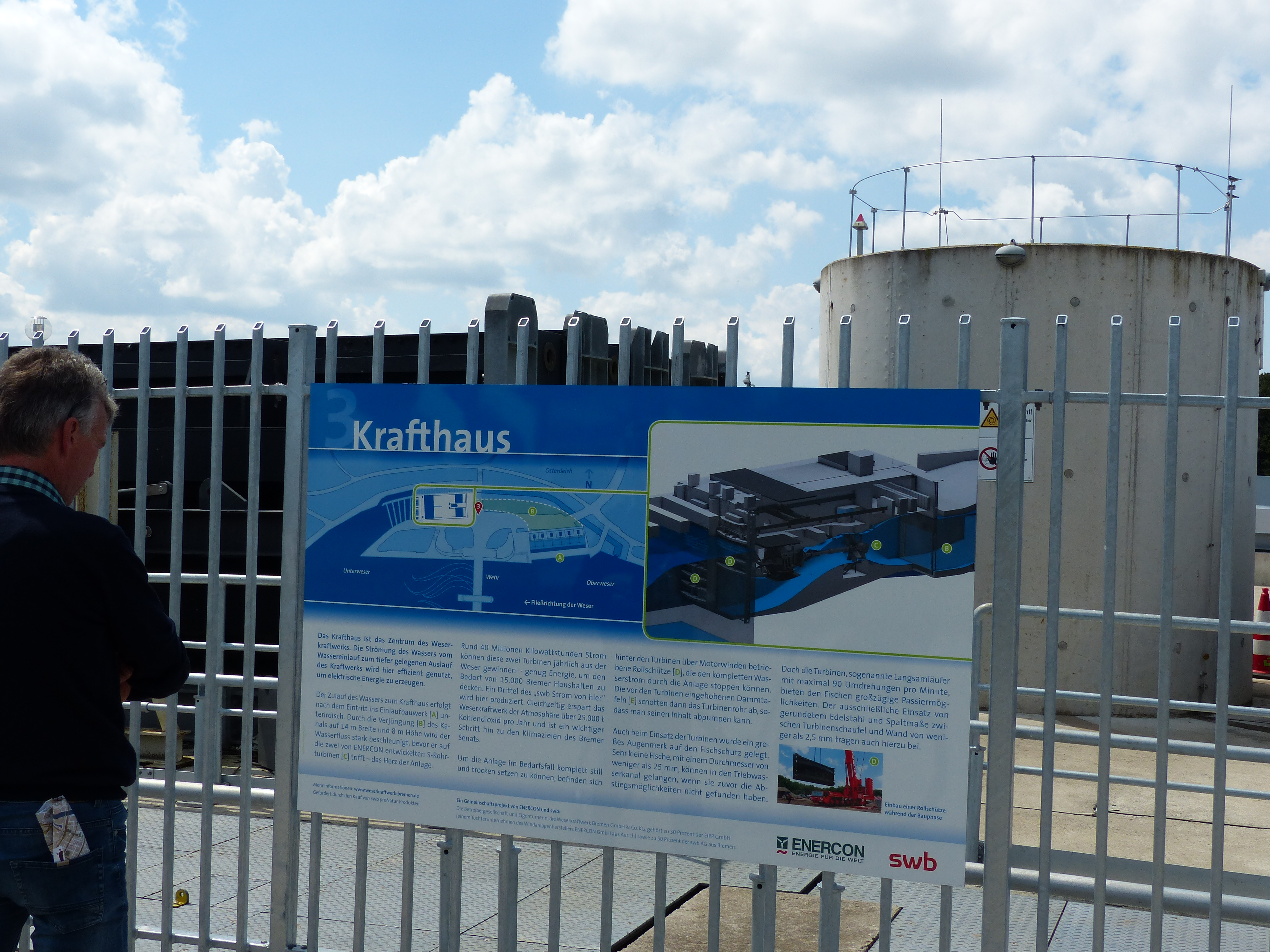 Neues Wasserkraftwerk am Bremer Weserwehr, Schautafel Krafthaus